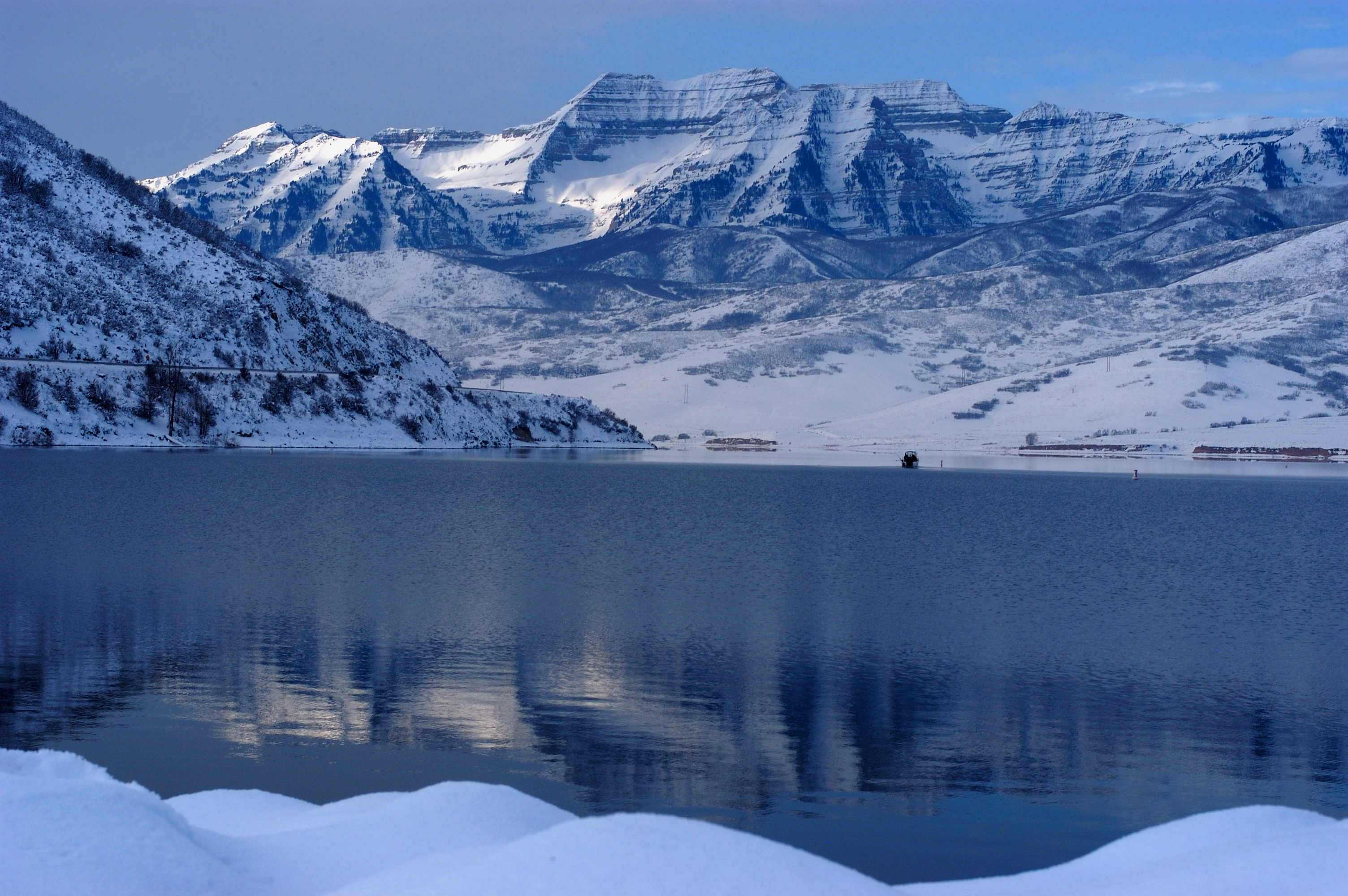 Best Viewed Large